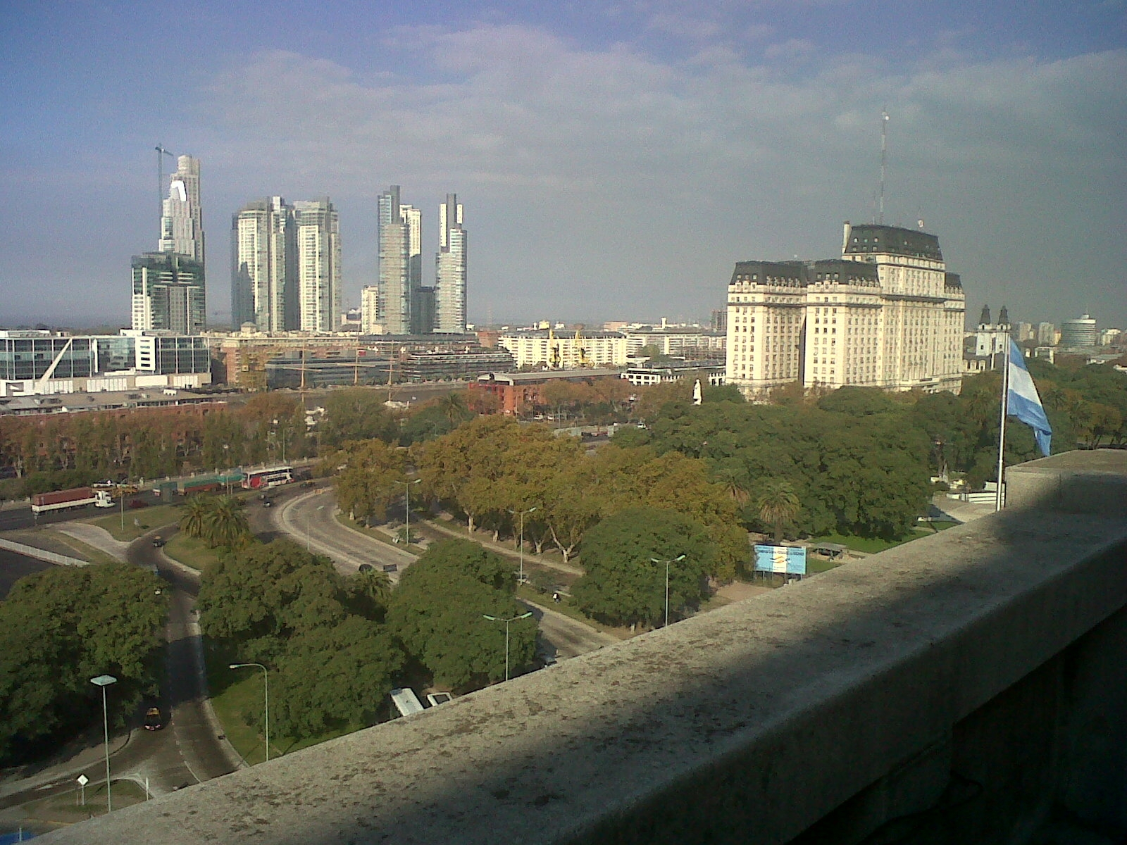 Edificio Libertador, Ministerio de Defensa y edificios de Puerto Madero desde el Ministerio del Interior